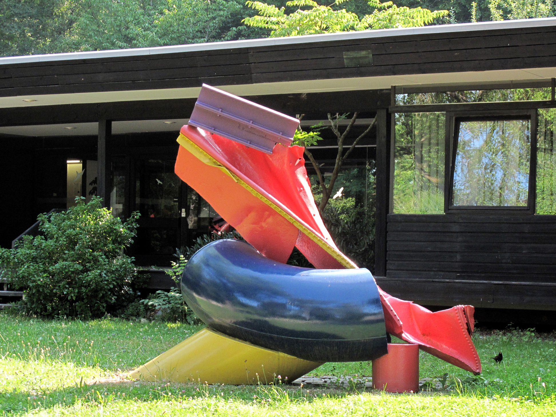 Klaus H. Hartmann, Pink Flamingo, 1989, - Kunstpfad Universität Ulm, Baden-Württemberg, Deutschland